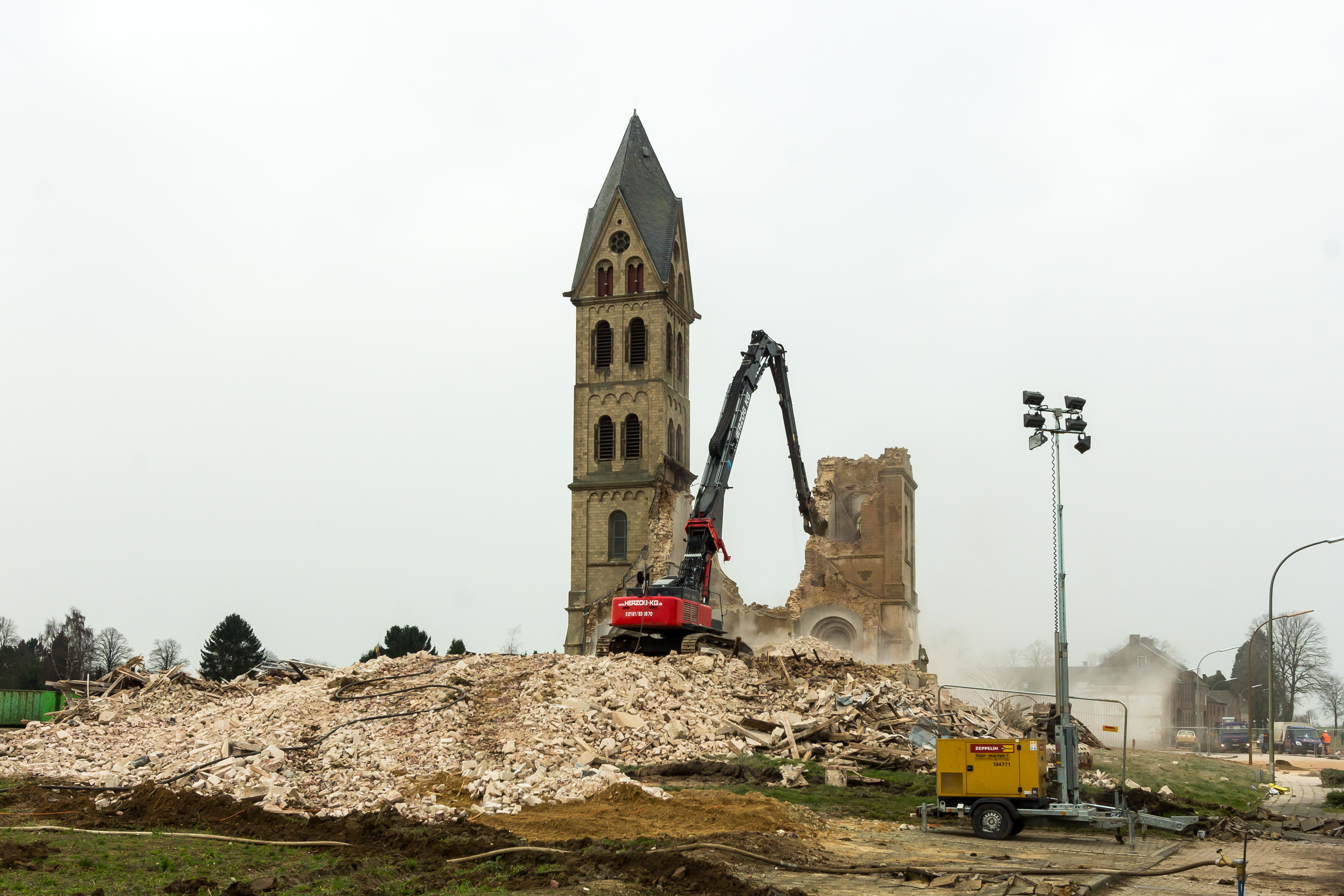 Abriss Immenrather Dom, St. Lambertus